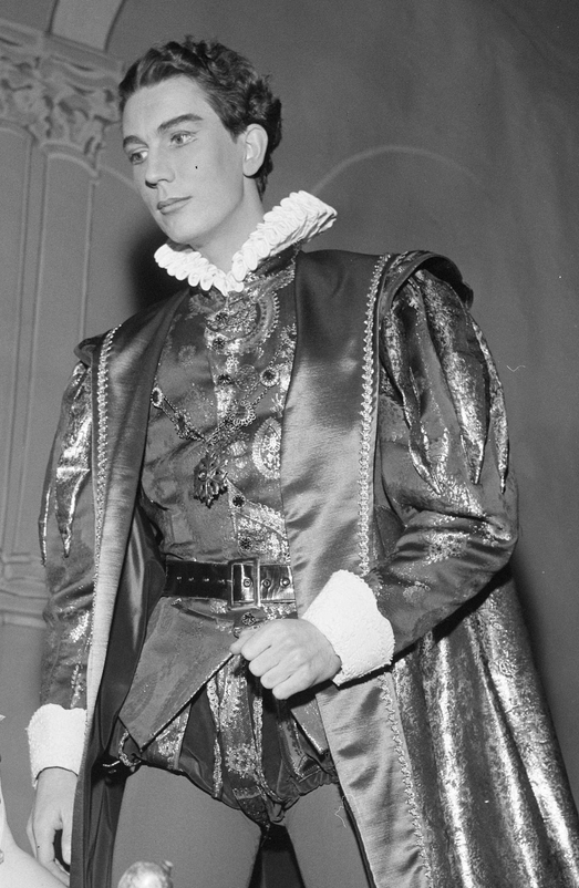 Knut Risan i Nationaltheatret.